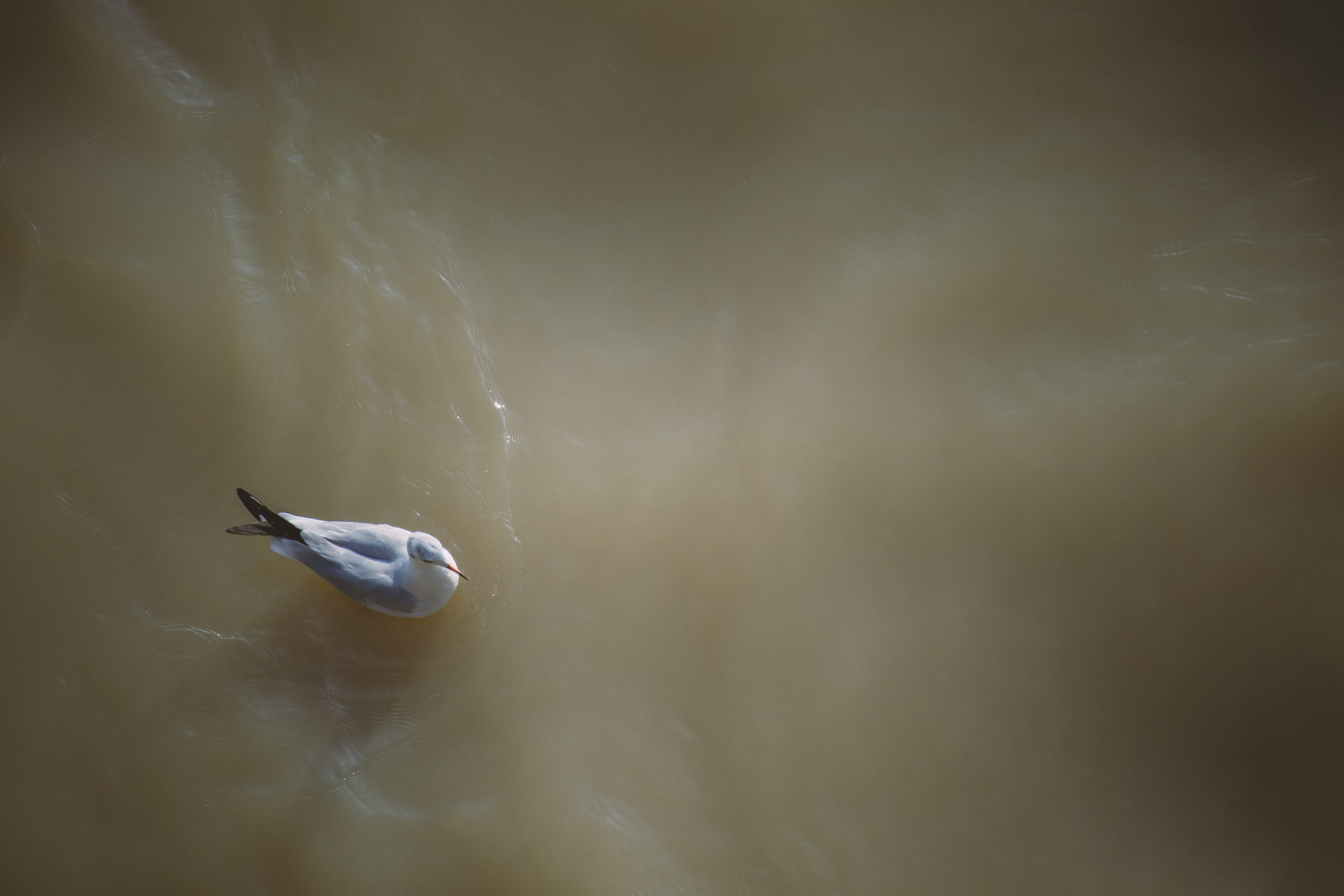 الحيوانات وتسمى أيضًا باسم "المَتْزَوِيّات" أي الحيوانات عديدة الخلايا. هي كائنات حقيقيات النوى ومتعددة الخلايا تشكل المملكة البيولوجية الحيوانية.